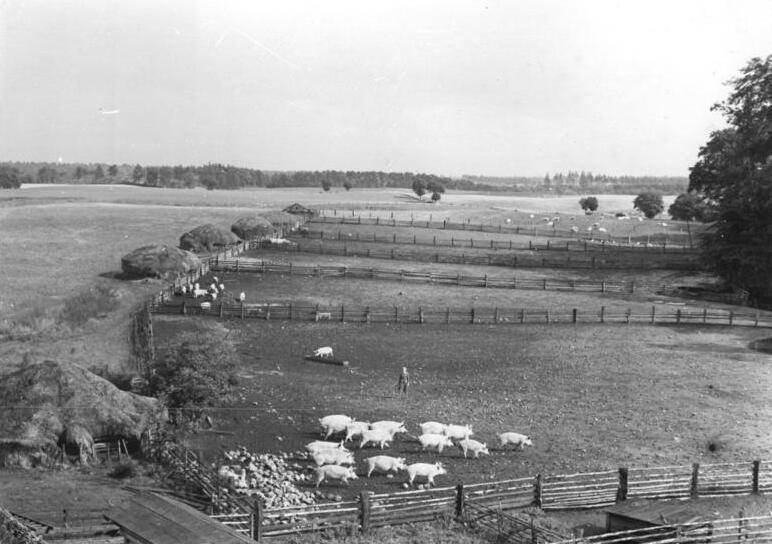 Zentralbild-Pietsch Me-Ho. 2.9.1953 Im volkseigenen Gut Gross-Stieten. Auf unseren volkseigenen Gütern sind insgesamt 246 Mastanstalten bisher errichtet worden. Für den Ausbau der notwendigen Nebenanlagen, wie Futterküchen, Abferkelställe usw. erhielten die Güter vom Staat zusätzliche Mittel. Auch für ausreichende Futtermittel ist gesorgt. Eine der vorbildlichsten Mastanstalten für Schweine hat das Volksgut Gross-Stieten im Kreis Wismar. UBz, Blick auf die Weiden mit den Schweinepilzen. die Sauen bleiben das ganze Jahr über im Freien, nur drei Wochen vor dem Abferkeln kommen sie in den Stall.